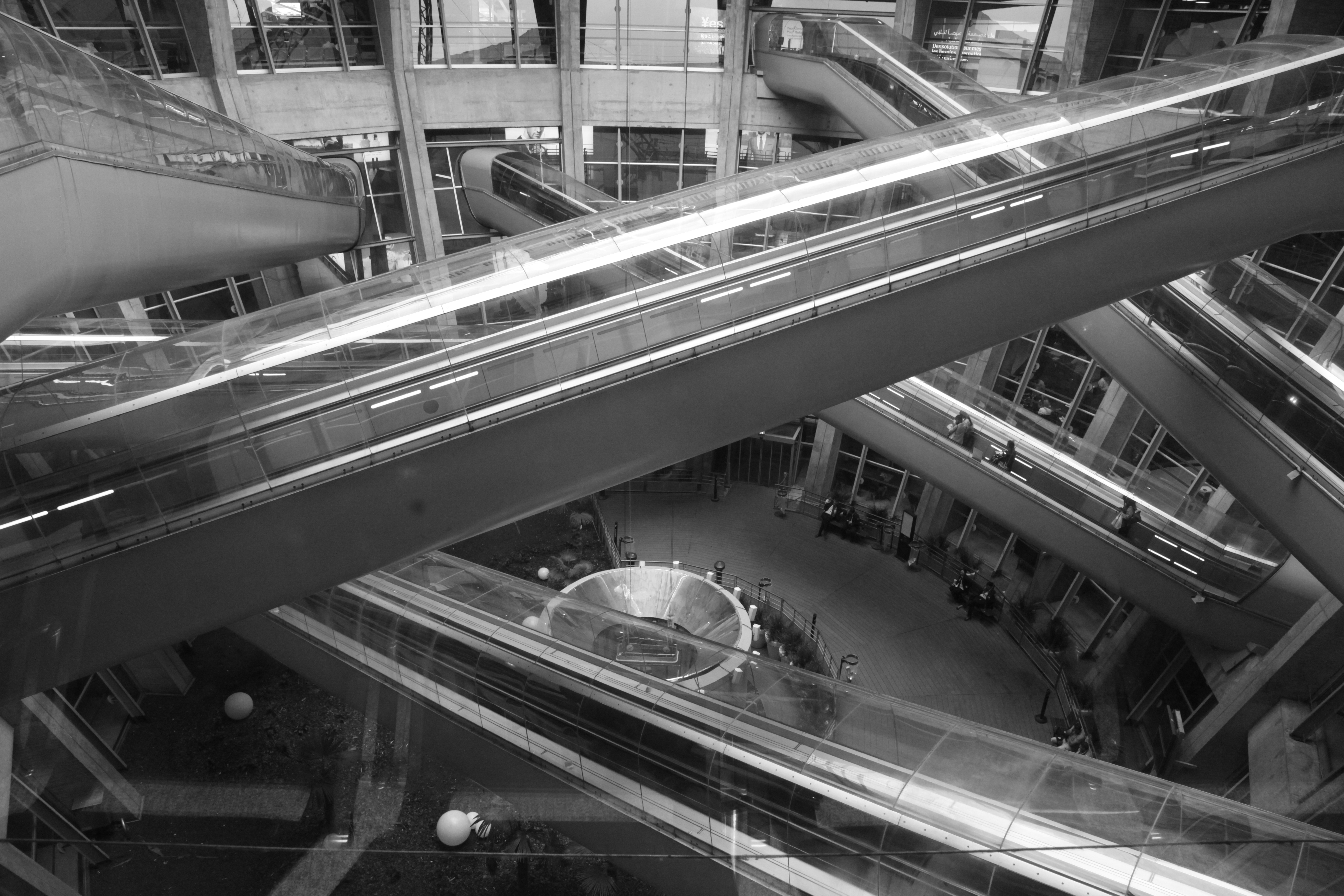 Paris-Charles de Gaulle Airport, Terminal 1, Innenhof Rollbänder